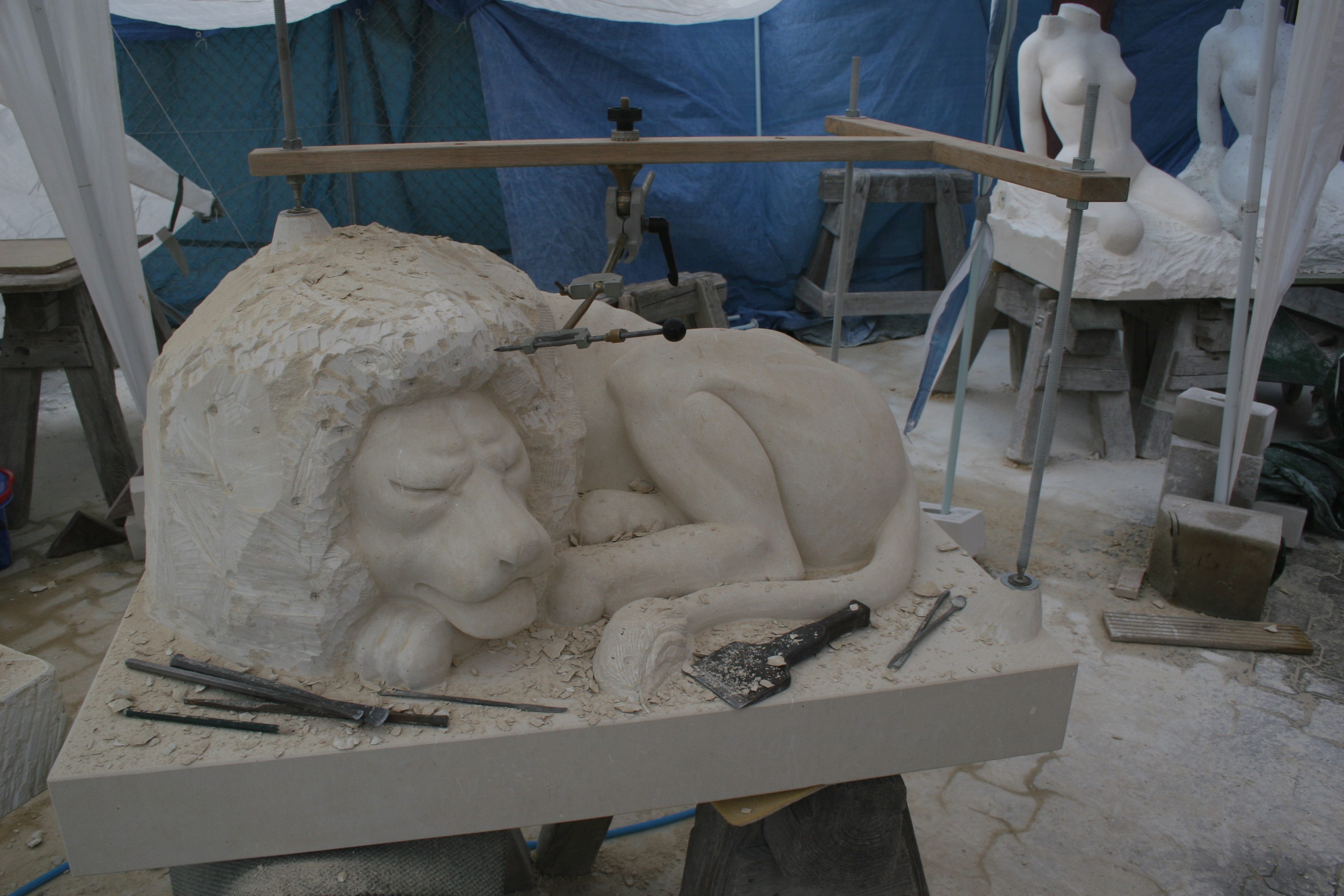 Punktiergerät an einem Werkstück